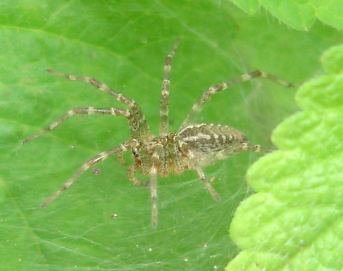 Funnel Weaving Spider (Agelena opulenta) Chiba, Japan, 2006-07-13